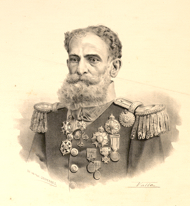 Generalíssimo Manuel Deodoro da Fonseca, Valle, [18?]. Fundação Biblioteca Nacional. Divisão de Iconografia.